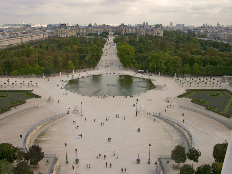 Le jardin des Tuileries, vue de la place de la Concorde. Au premier plan, un bassin. Au fond le Louvre. Vue aérienne prise de la grande roue.